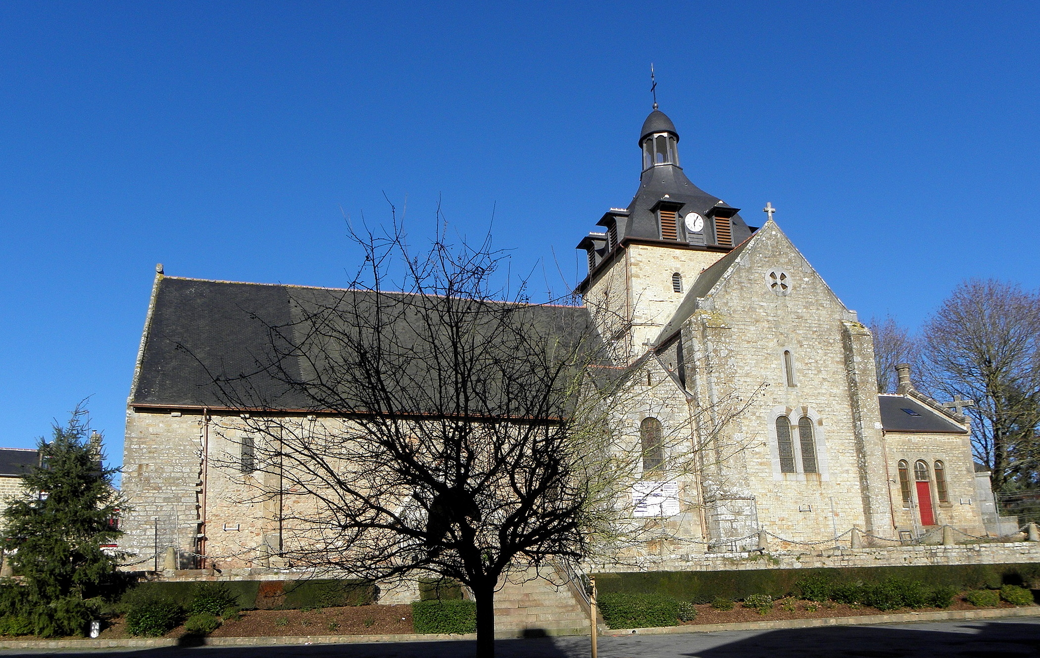 Façade méridionale de l'église prieurale Saint-Martin de Tremblay (35).